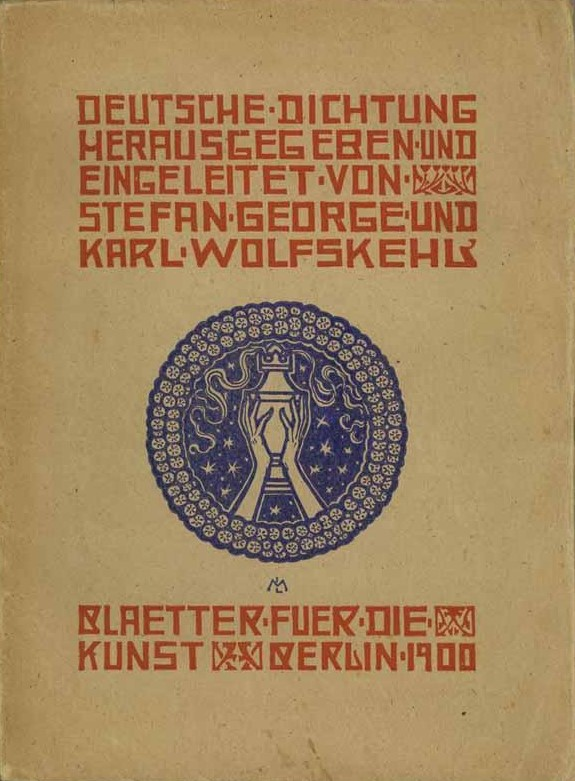 Deutsche Dichtung. Herausgegeben von Stefan George und Karl Wolfskehl, Blätter für die Kunst, Berlin, 1900. Erster Band der Reihe, erschienen in 403 Exemplaren. (Thema: Jean Paul. Ein Stundenbuch für seine Verehrer). Umschlagzeichnung von Melchior Lechter